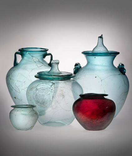 Vasi di vetro (Museo Archeologico Nazionale e Area Archeologica di Altino)